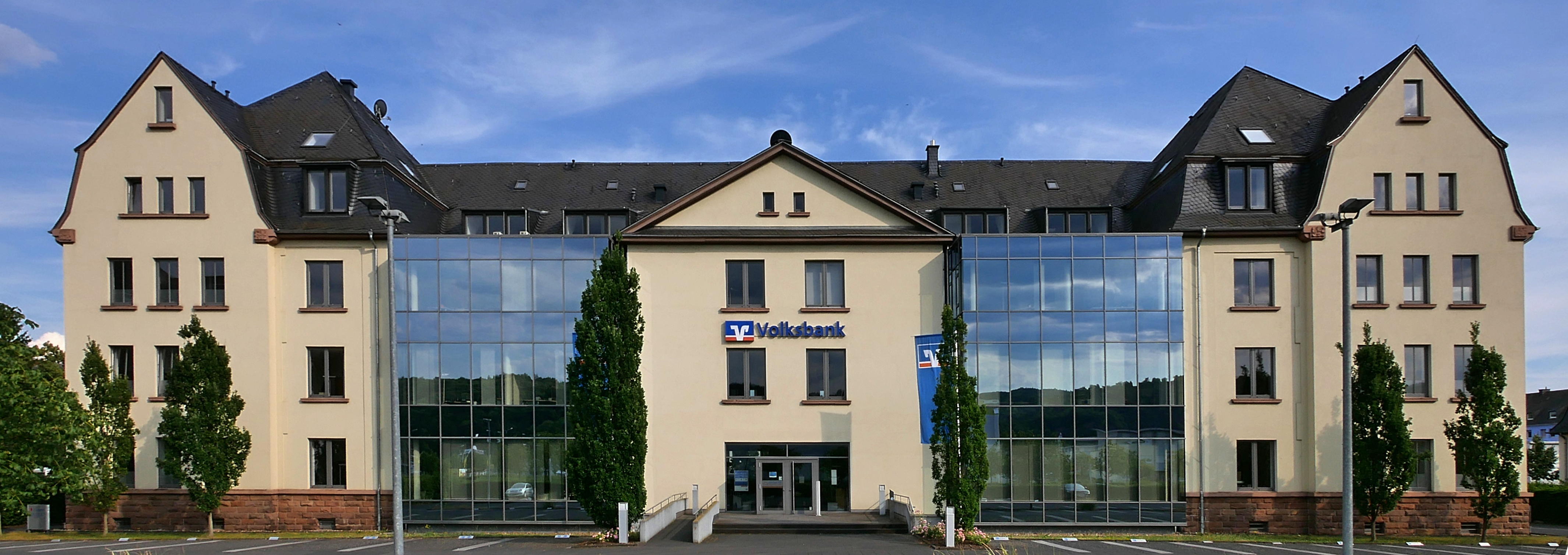 Trier :ehemalige Jaegerkaserne HerzogenbuscherStrasse 10 jetzt Sitz der Volksbank Trier